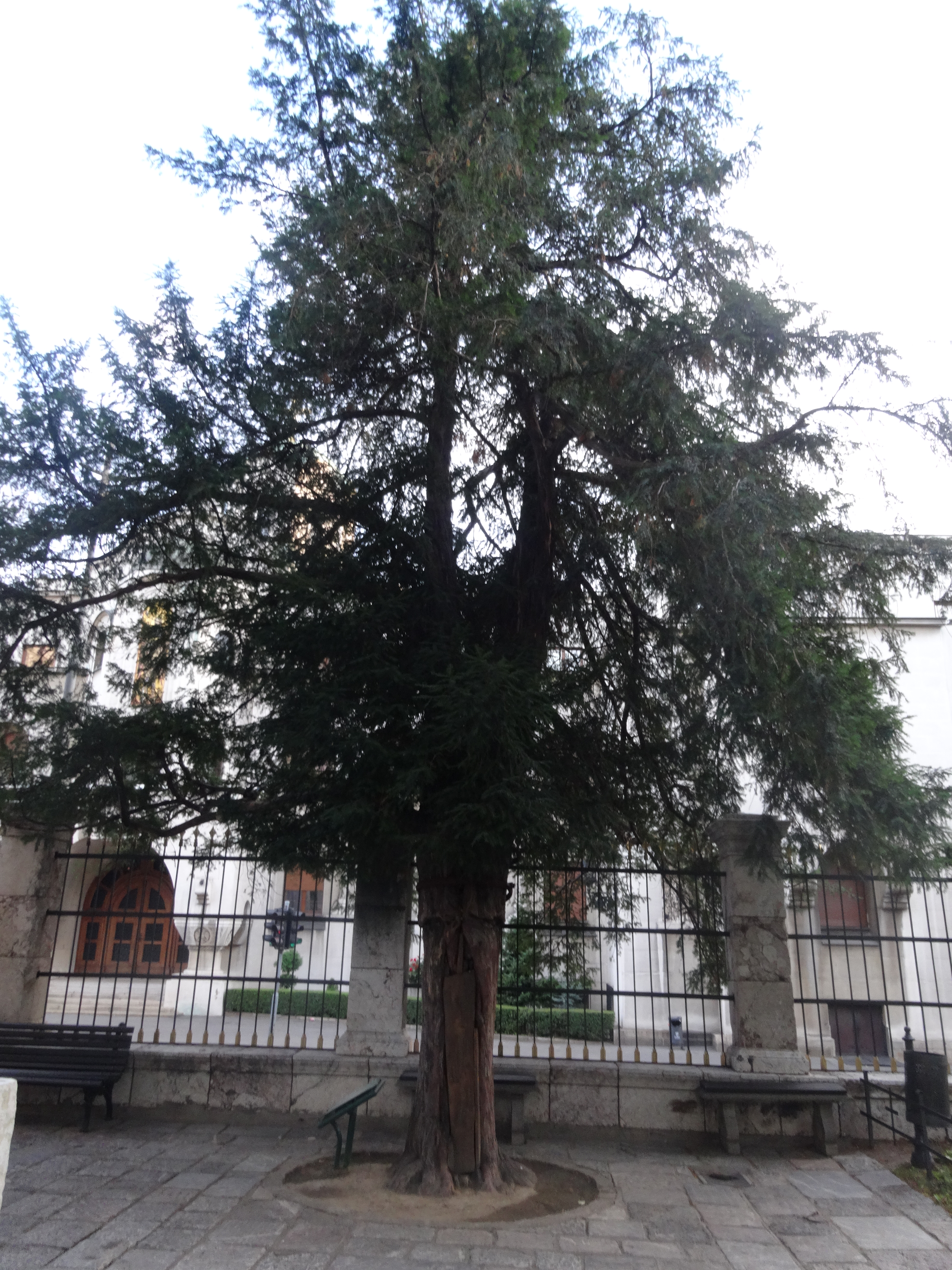 Споменик природе Две тисе Саборне цркве Ово је фотографија заштићеног природног добра у Србији под шифром: СП012 This is a a photo of a natural area in Serbia with ID: СП012